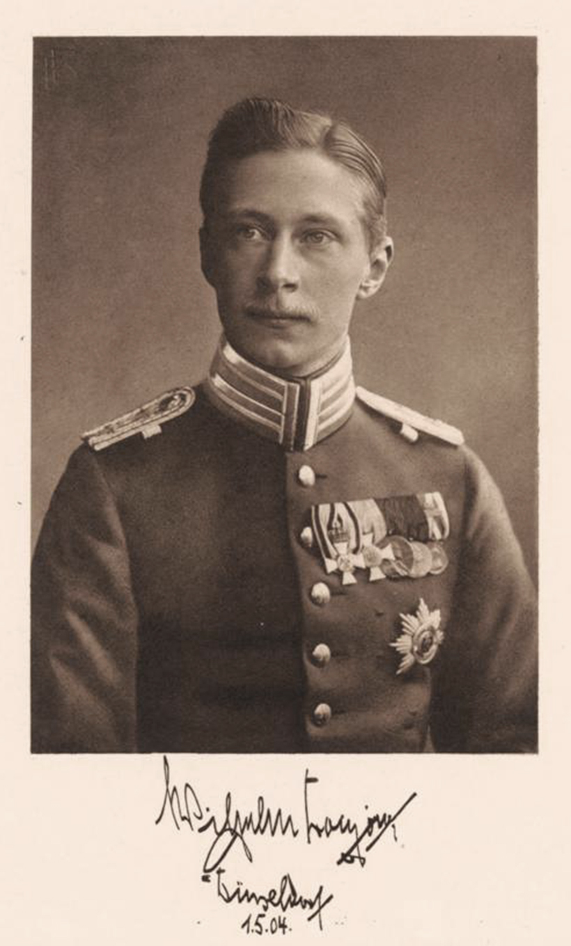 Kronprinz Wilhelm, Düsseldorf 1. Mai 1904, Heliogravür F. Bruckmann A.-G. in München, in Heinrich Frauberger: Internationale Kunstausstellung, Kunsthistorische Ausstellung, Grosse Gartenbau-Ausstellung, 1904, Bagel, Düsseldorf, 1905